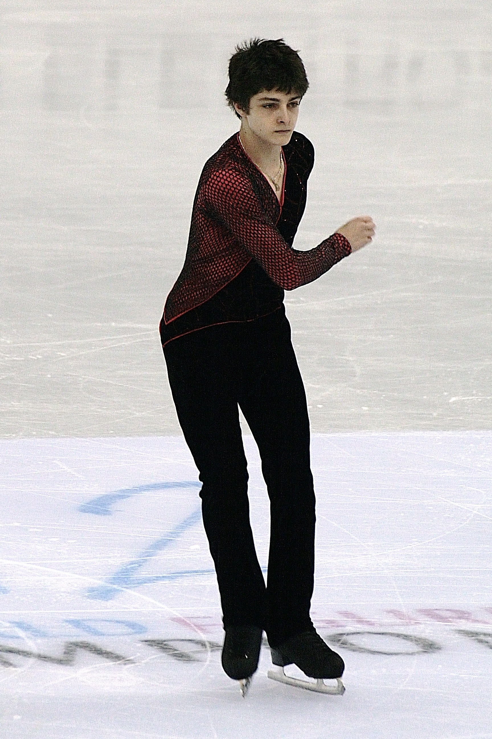 Брэндан Керри (Австралия) на чемпионате мира по фигурному катанию 2012